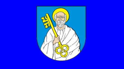 Flaga Ciechanowa